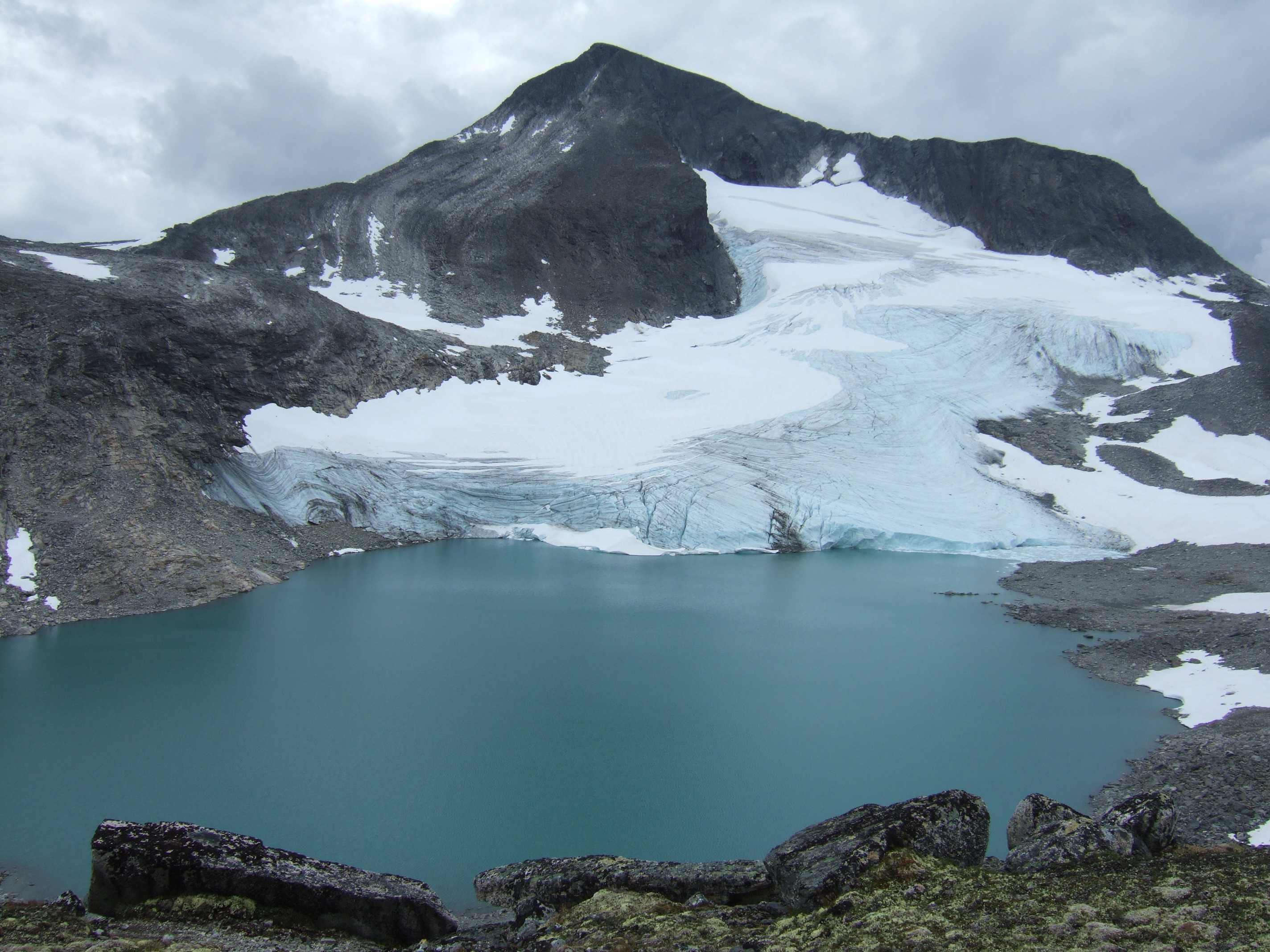 Tordsnose is a border mountain between Skjåk municipality in Oppland and Norddal municipality in Møre og Romsdal.